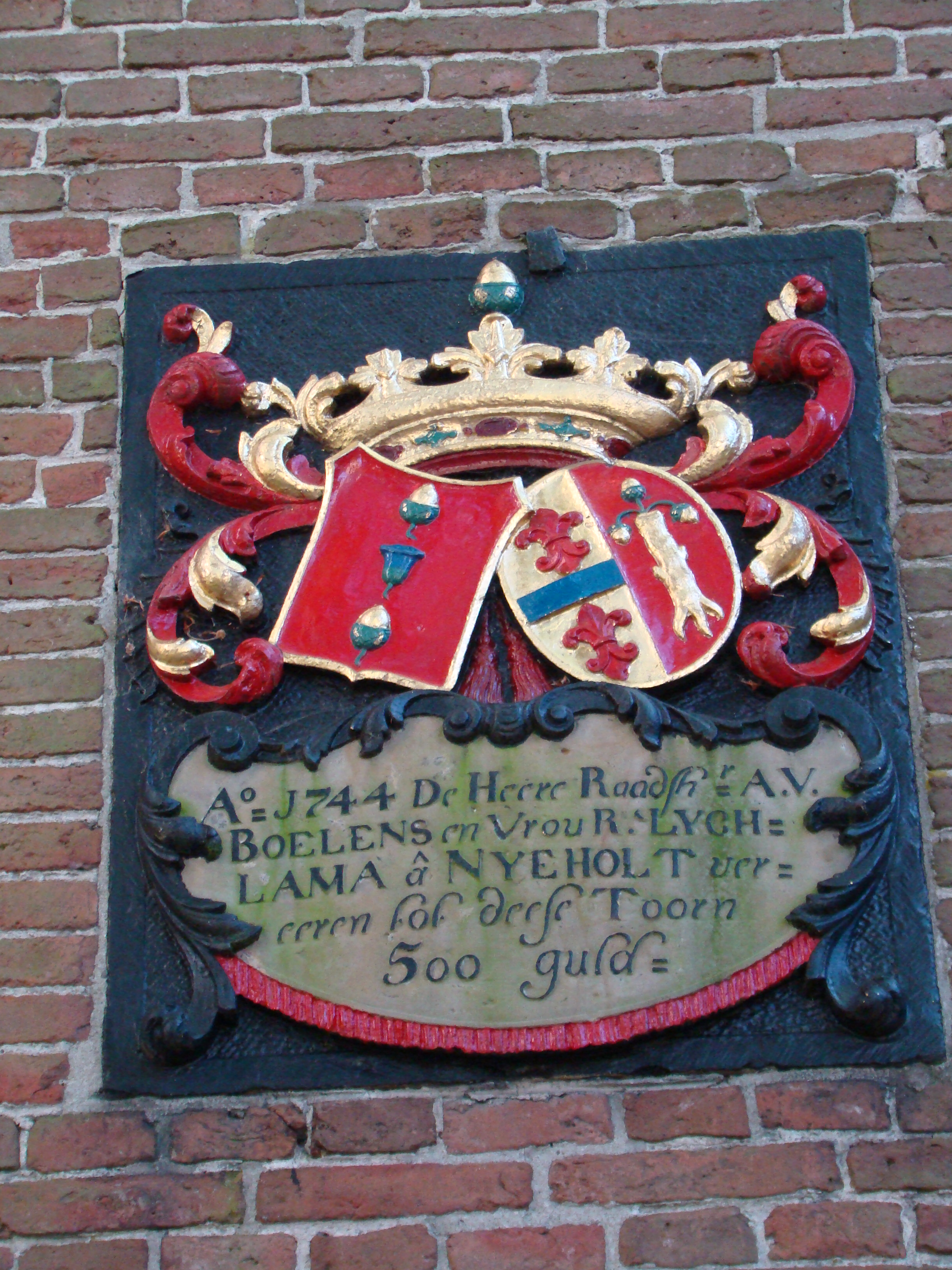 Impressions of Beetsterzwaag (Netherlands)